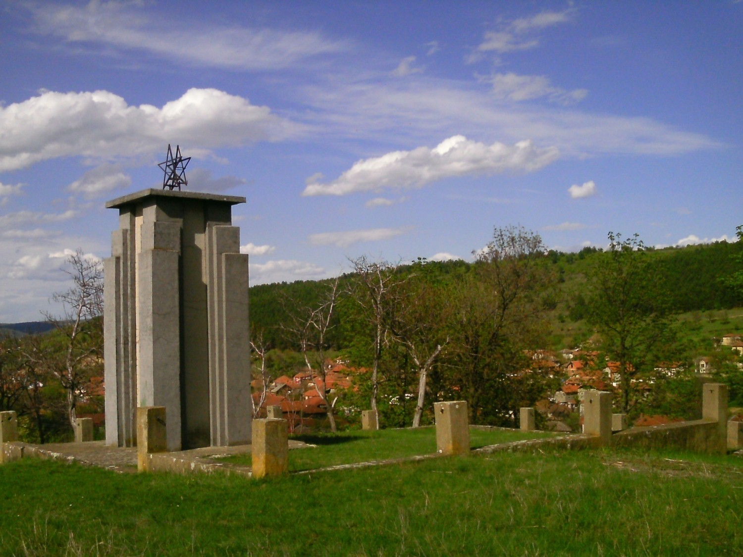 Поглед на "Горњи крај" Великог Извора, са оближњег брда. На левој страни фотографије се налази Руски споменик. Licensing